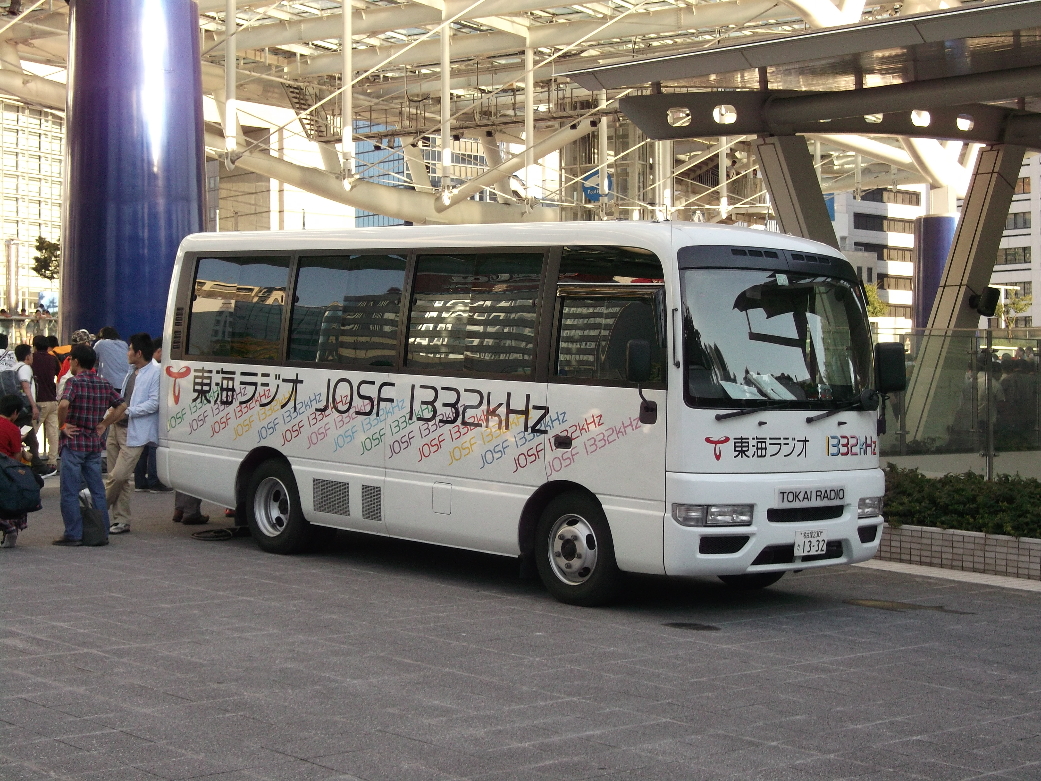 東海ラジオ放送所有のマイクロバス。オアシス21において行われた創立55周年記念イベントにおいて撮影。公道より撮影。